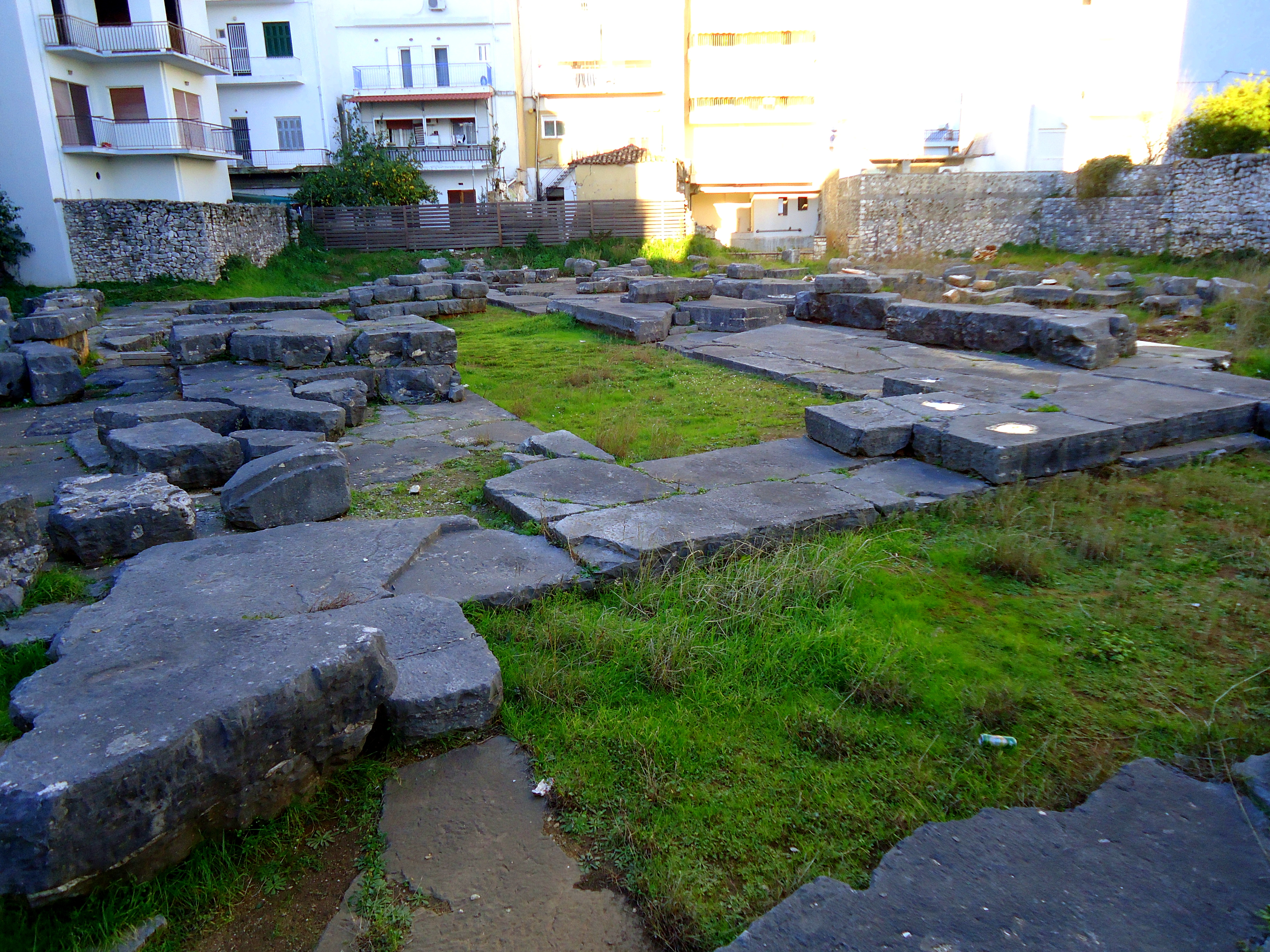 Ο σημαντικότερος ναός της αρχαίας Αμβρακίας, που ήταν αφιερωμένος στον Απόλλωνα Πύθιο Σωτήρα και δέσποζε στο δημόσιο χώρο της πόλης, βρίσκεται στο κέντρο της Άρτας, κοντά στην πλατεία Κιλκίς. Χρονολογείται γύρω στο 500 π.Χ., με βάση πώρινα αρχιτεκτονικά μέλη, που βρέθηκαν διάσπαρτα στον περιβάλλοντα χώρο, ωστόσο στην ίδια θέση πρέπει να υπήρχαν και παλαιότερα ιερά του Απόλλωνα. Στο ναό αυτό, που ήταν το κύριο ιερό της πόλης, φαίνεται ότι οι αρχές ανέθεταν τα δημόσια κείμενα, όπως προκύπτει από την εύρεση ενός σημαντικού δημόσιου εγγράφου, μιας ενεπίγραφης στήλης με κείμενο συνθήκης καθορισμού των ορίων μεταξύ των πόλεων Αμβρακίας και Χαράδρου, που χρονολογείται στο 2ο αι. π.Χ., αμέσως μετά τη ρωμαϊκή κατάκτηση, και παρέχει σημαντικές πληροφορίες για τη διοίκηση των ηπειρωτικών πόλεων. Ο ναός ήταν μεγαλοπρεπής, δωρικού ρυθμού, περίπτερος, με πρόναο και επιμήκη σηκό, και είχε διαστάσεις 44 x 20,75 μ. Στο βάθος του σηκού διατηρείται η θεμελίωση του βάθρου για το άγαλμα ή το σύμβολο του Απόλλωνα. Από το μνημείο σώζεται μόνο η κρηπίδα και η ευθυντηρία, αφού ήδη από τους πρώιμους χριστιανικούς χρόνους άρχισε να λιθολογείται, καθώς χρησίμευσε ως λατομείο, ενώ την ίδια περίοδο επάνω στα αρχαία ερείπια κατασκευάσθηκαν και κεραμοσκεπείς τάφοι.